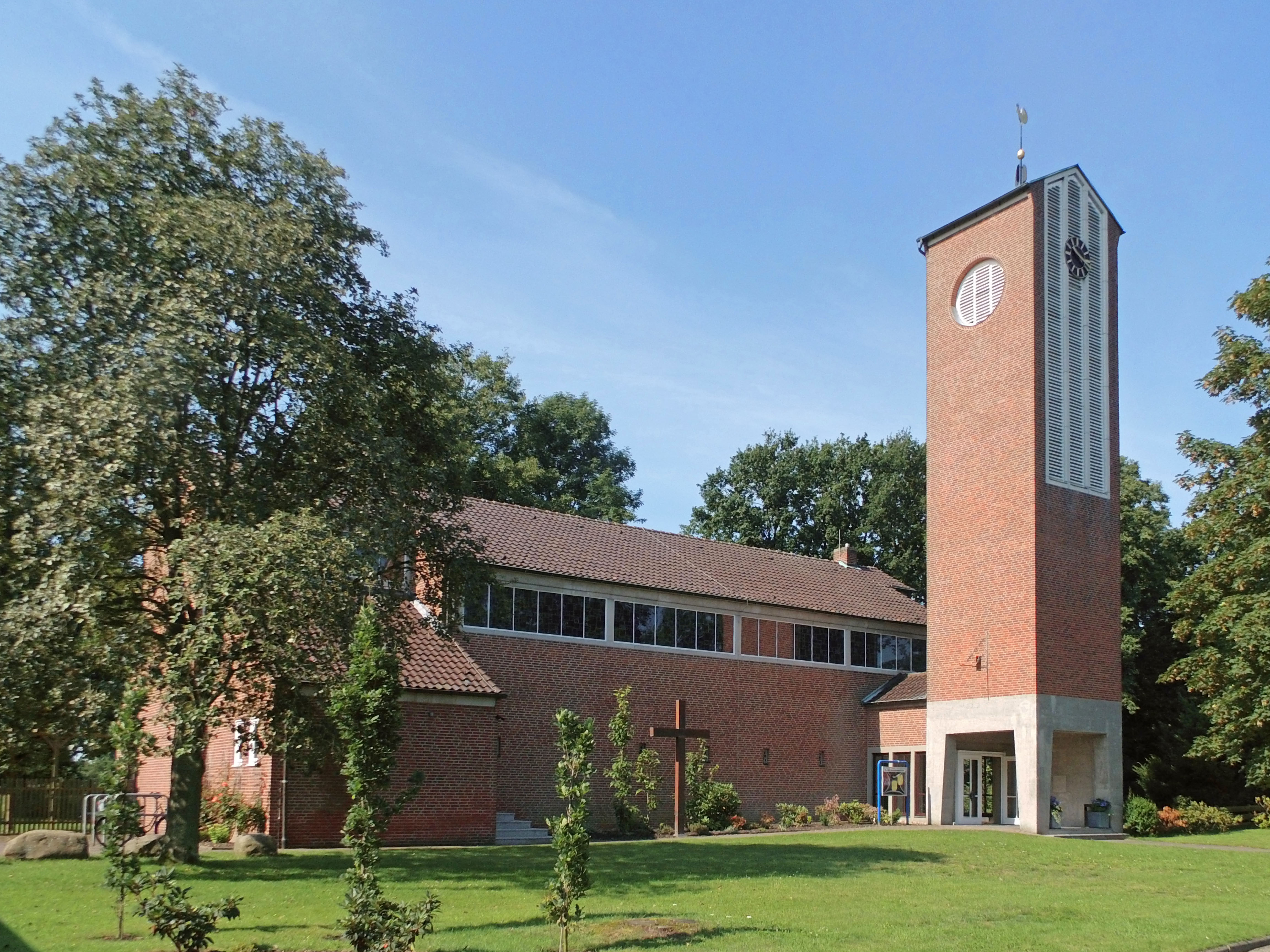 Evangelisch-lutherische Auferstehungskirche in Weyhausen (Landkreis Gifhorn).